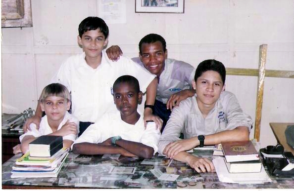 Fotografía personal, Albeiro Rodas, jovenes cartageneros, para el artículo pertinente. Donación a la wikipedia.